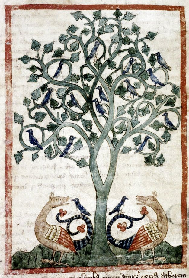 Perideksionu koks, Bodlienas (Bodleian) bibliotēka, MS. Douce 151, Folio 71v, Oksforda, Anglija.